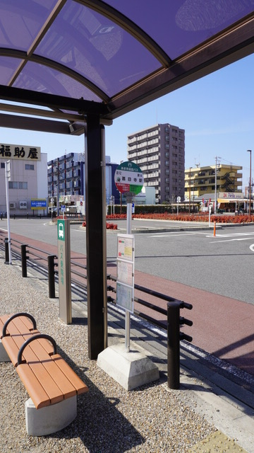 あま市巡回バスの停留所（甚目寺駅）